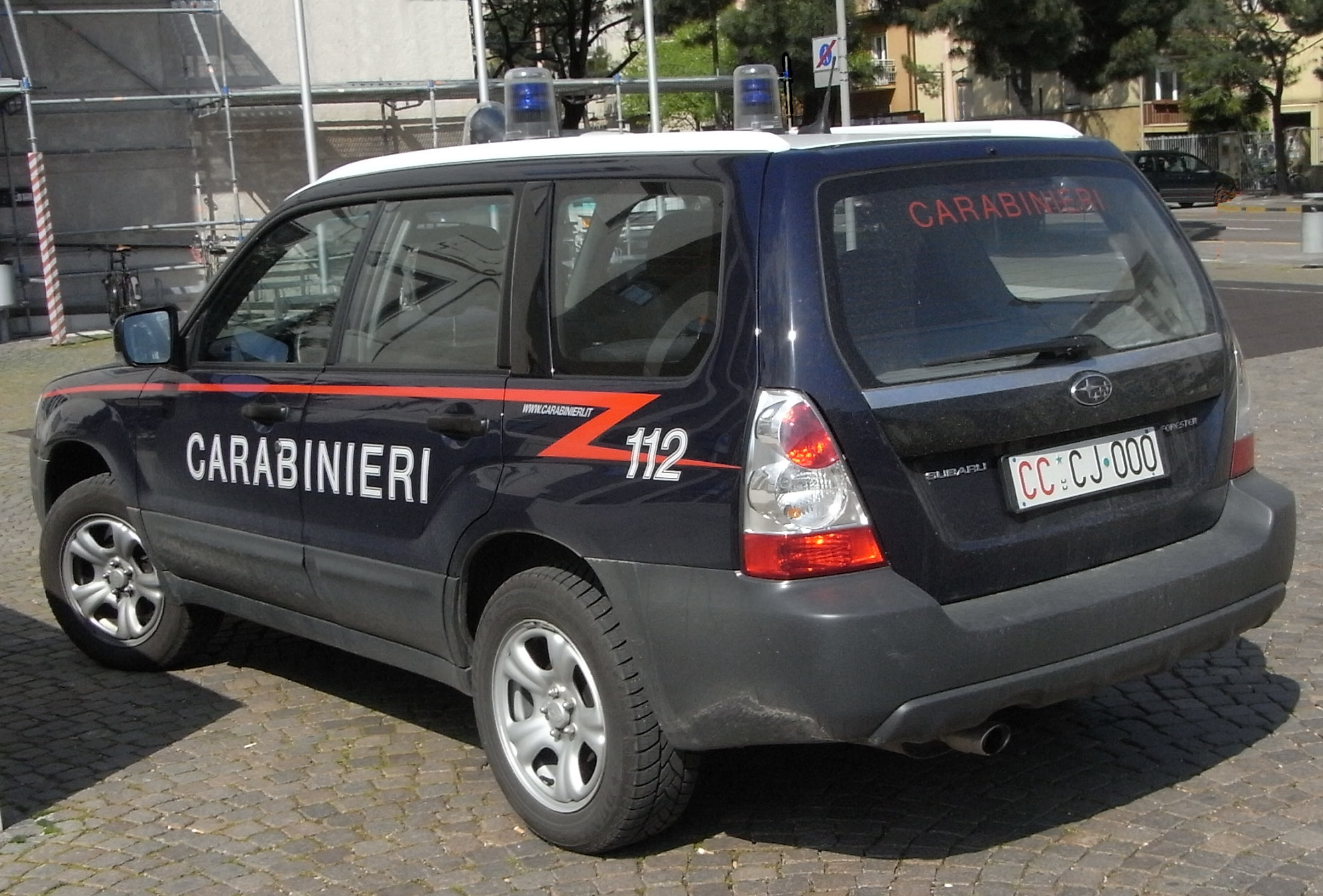 Karabenista/karabiniera aŭto. Numerŝildo anonimigita.